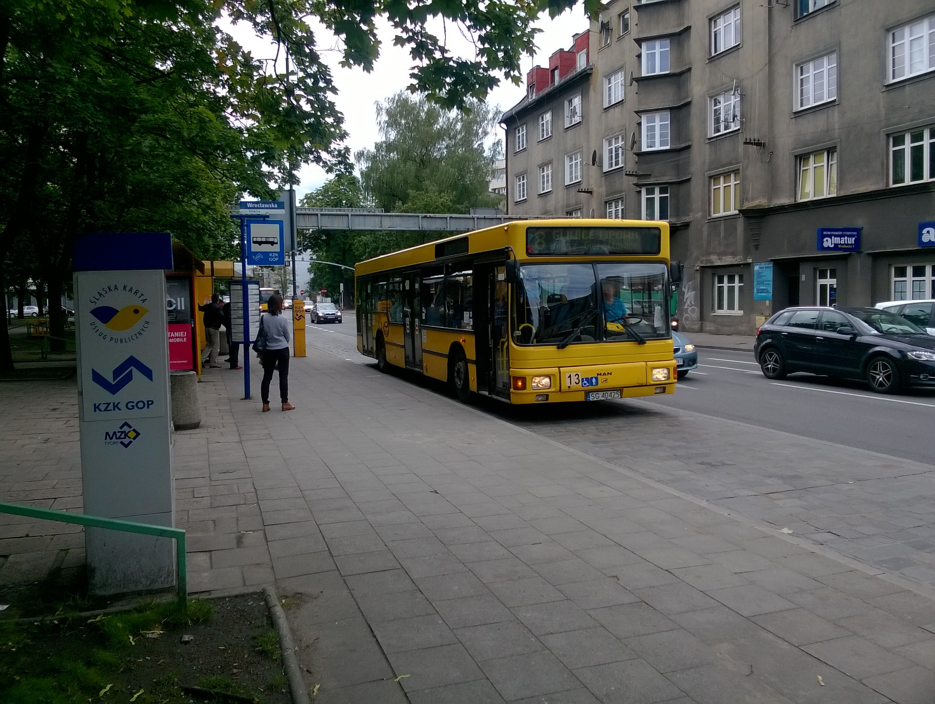 MAN NL 222 w Gliwicach na przystanku Wrocławska